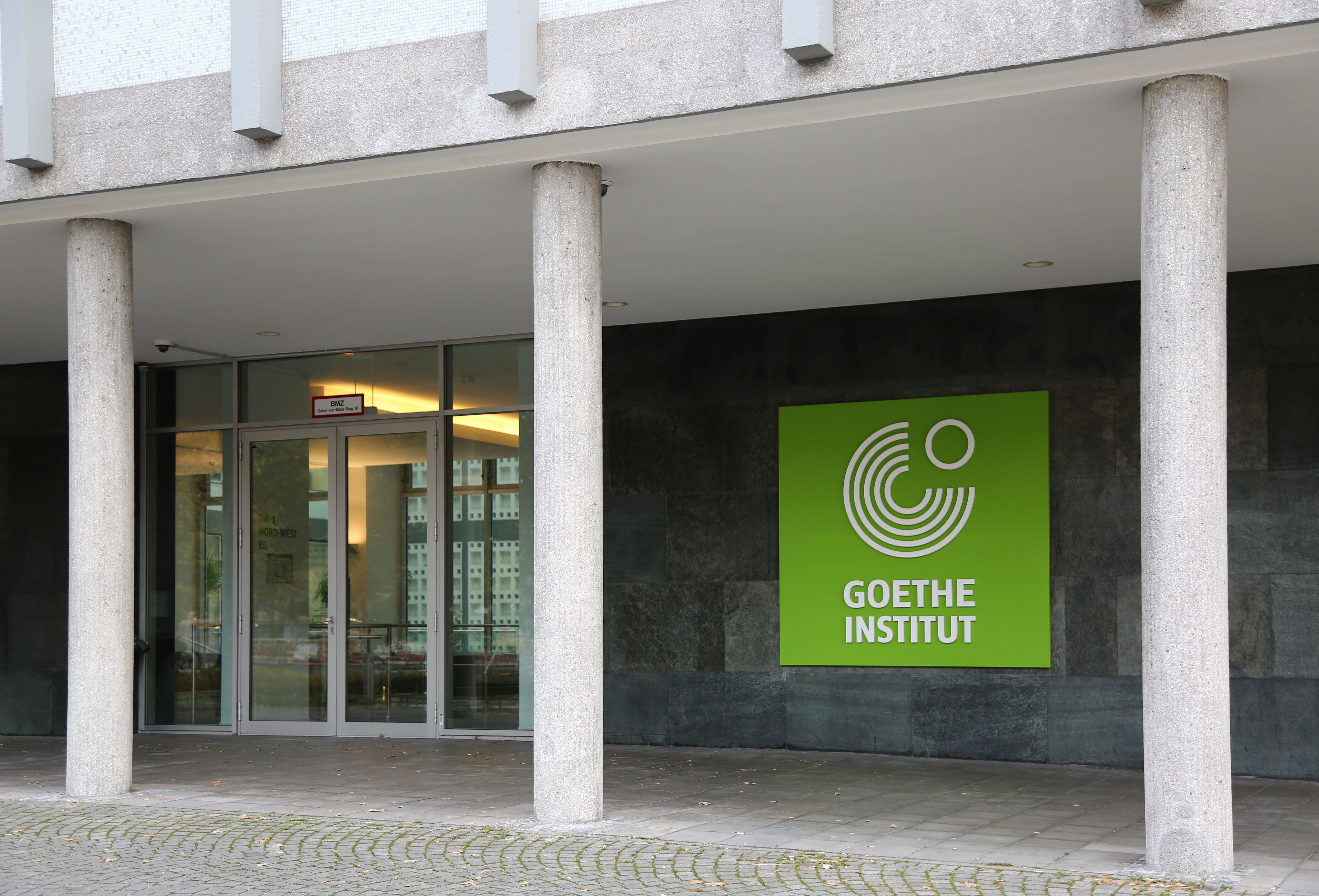 Oskar-von-Miller-Ring 20 , München. Oskar-von-Miller-Ring 18; Verwaltungsgebäude, Stahlbetonskelettbau mit zurückgesetztem fünftem Obergeschoß und konkav geschwungenem Dach in städtebaulicher Ecklage am neu angelegten Oskar-von-Miller- Ring, über quadratischem Grundriss um einen Innenhof errichtet, mit Arkadengänge zur Straße, Fassadengliederung durch vor die Fensterflucht gestellte Stahlbetonpfeiler und in diese sichtbar eingespannte Geschossdecken, Fassadenflächen aus Sichtbeton und weißer Glasmosaikverkleidung, von Eduard von der Lippe und Hans Maurer, 1954–56. Errichtet für die Siemens AG, 2001 renoviert für die MEAG, gemeinsamer Vermögensmanager von Munich Re und ERGO. Seit 2019 Zentrale des Goethe Instituts